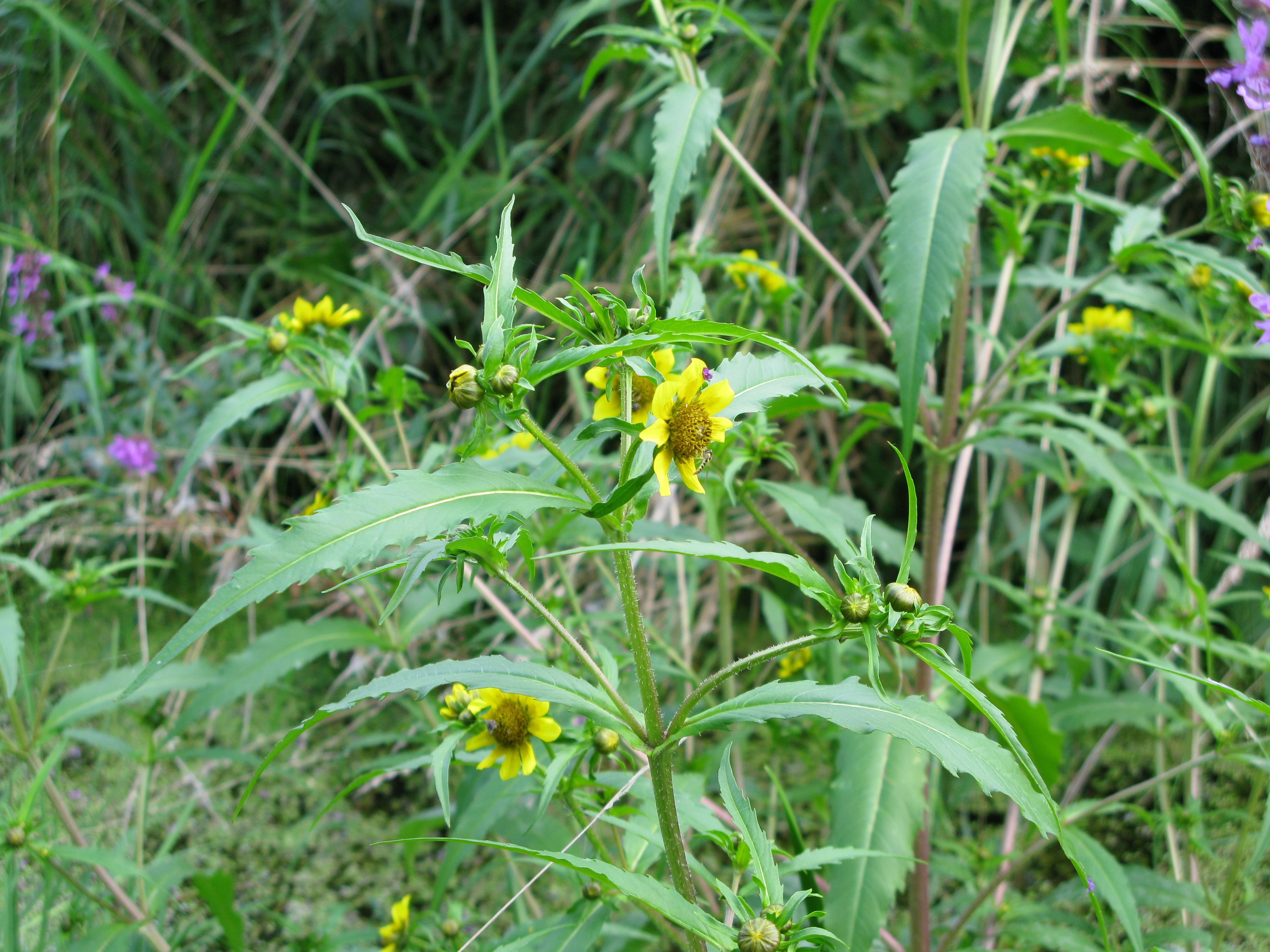 Nickender Zweizahn